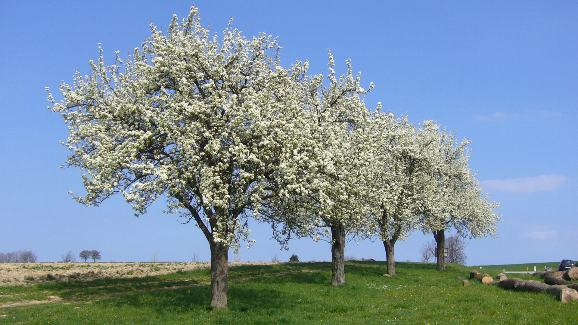 Blühende Apfelbäume im Mostviertel, Niederösterreich